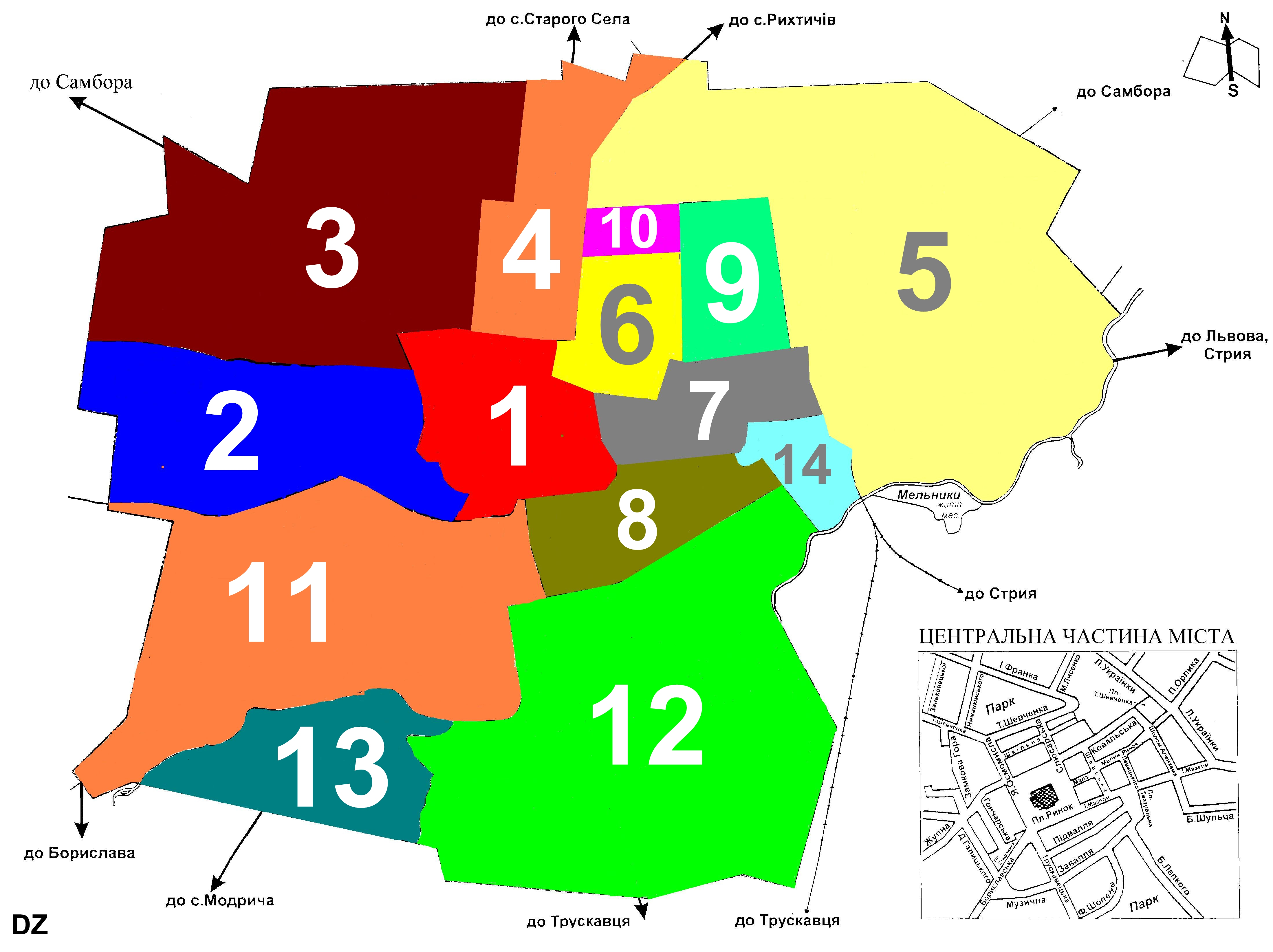 (Умовний) поділ міста Дрогобича на "райони".